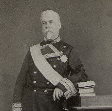 Político español del siglo XIX. Diputado. Ministro de Marina 1858-1860